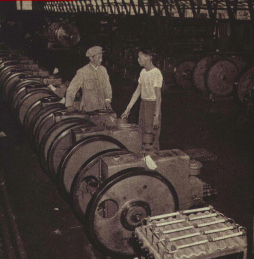 1952年 吴淞机器厂（1953年更名为上海柴油机厂）